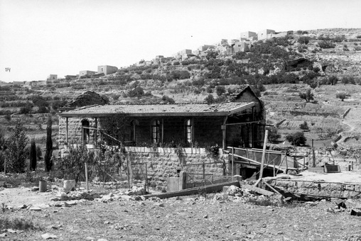 בית משפחת מקלף במוצא, לאחר הפוגרום 1929